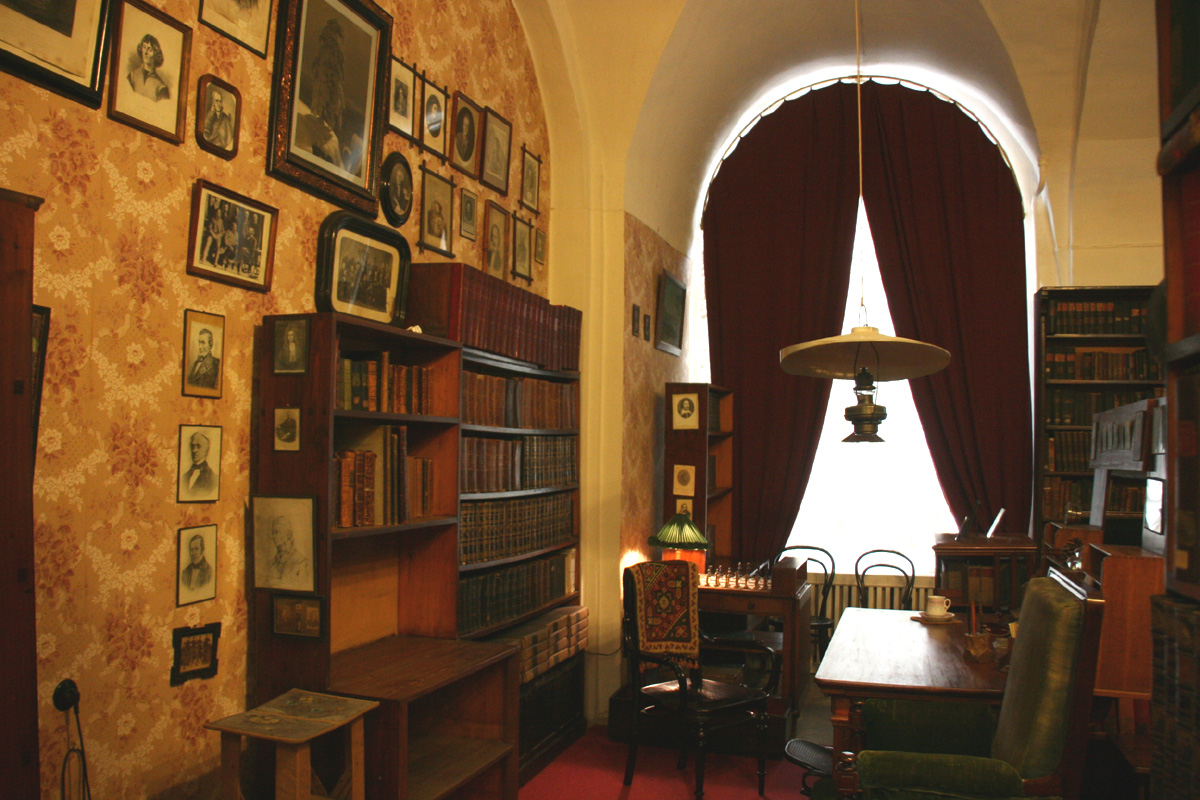 Bureau et bibliothèque de Mendeleïev dans son appartement de Saint-Pétersbourg